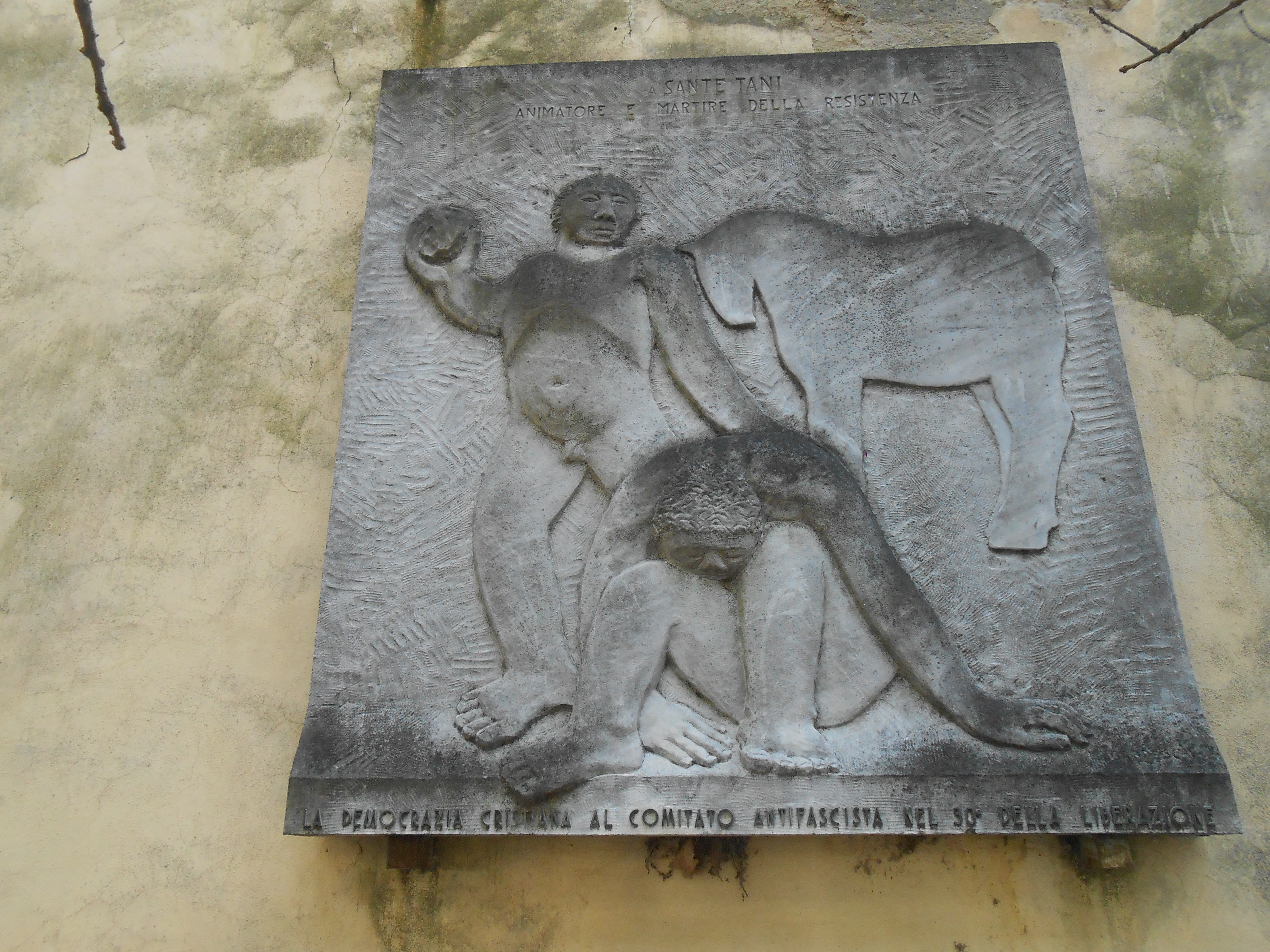 Lapide in ricordo di Sante Tani presente nel cortile del comune di Arezzo (palazzo dei Priori)